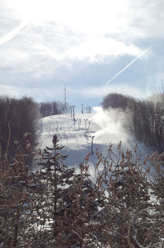 Hidden Valley Resort (Pennsylvania)